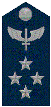 Distintivo de Tenente Brigadeiro do Ar da FAB.